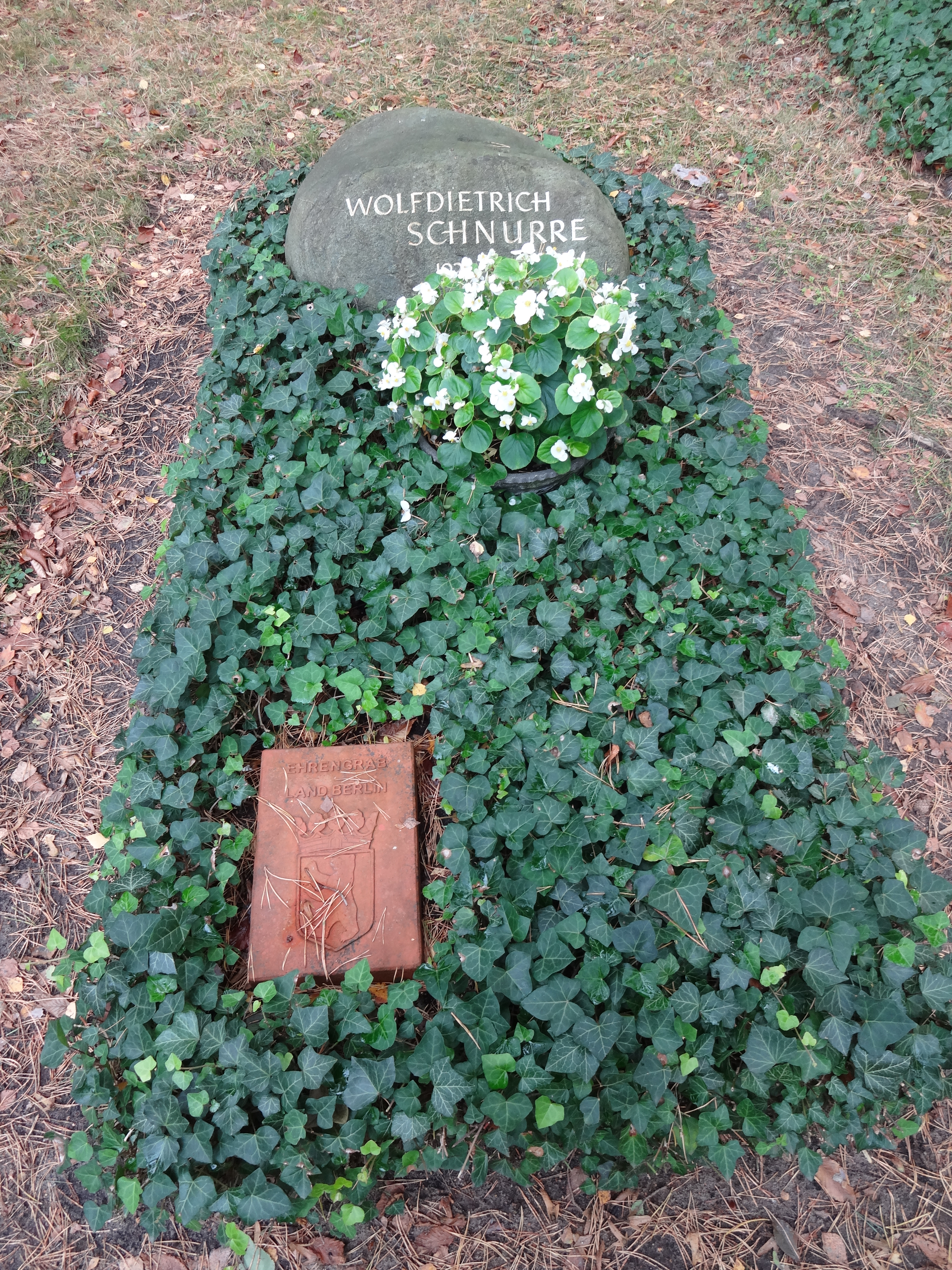 Grabstätte von Wolfdietrich Schnurre auf dem Waldfriedhof Zehlendorf; Ehrengrab der Stadt Berlin